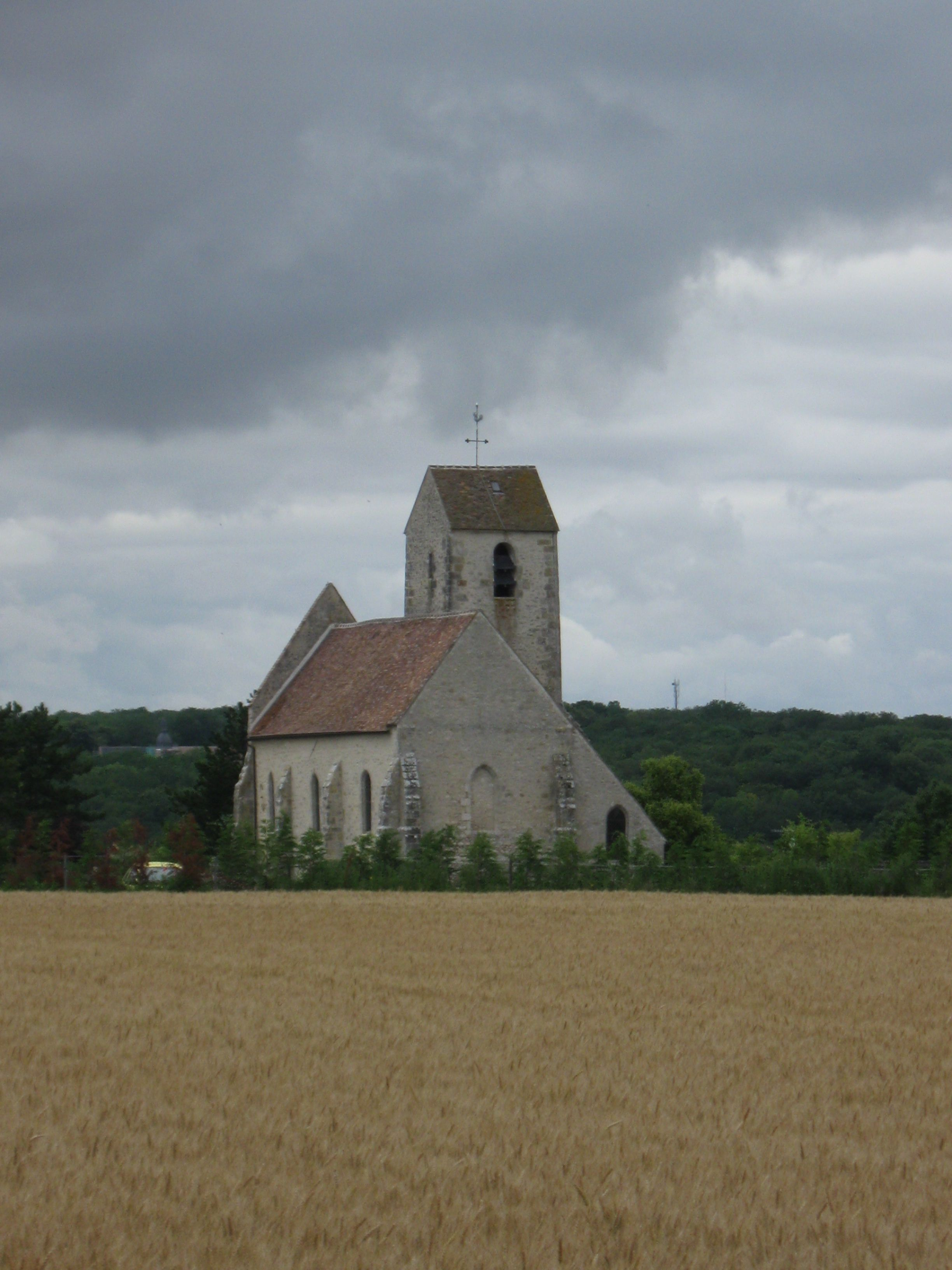 Église catholique Saint-Maur-et-Sainte-Fare de Buthiers (département de la Seine et Marne, région Île-de-France).